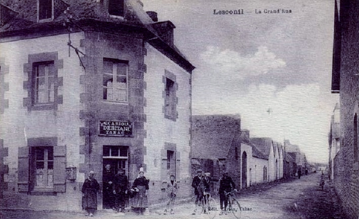 La grande rue de Lesconil en 1915 (carte postale)